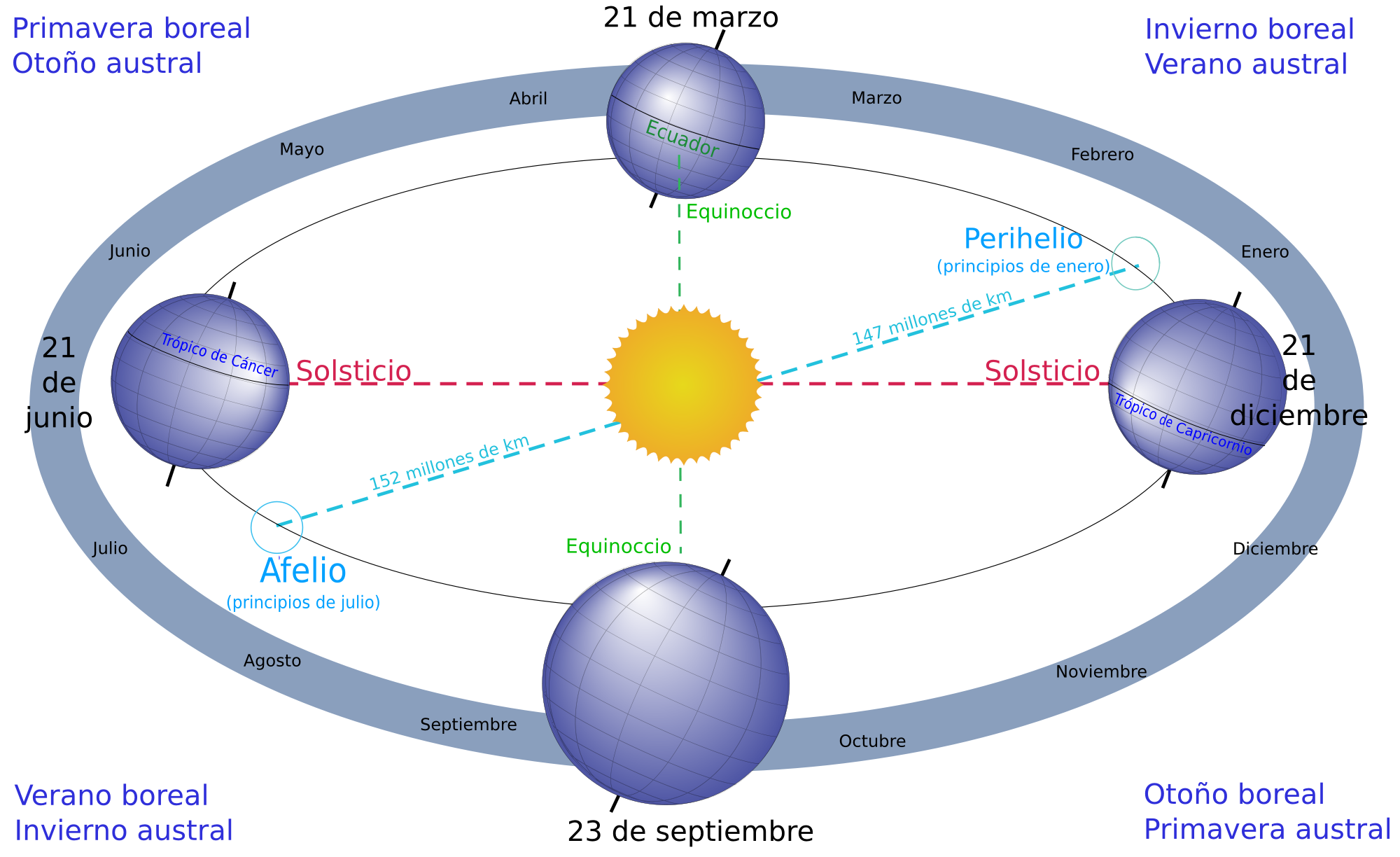 Estaciones del año, solsticios, equinoccios, perihelio y afelio, Este es un esquema a modo ilustrativo por lo que no está a escala y las fechas y las distancias pueden variar levemente.